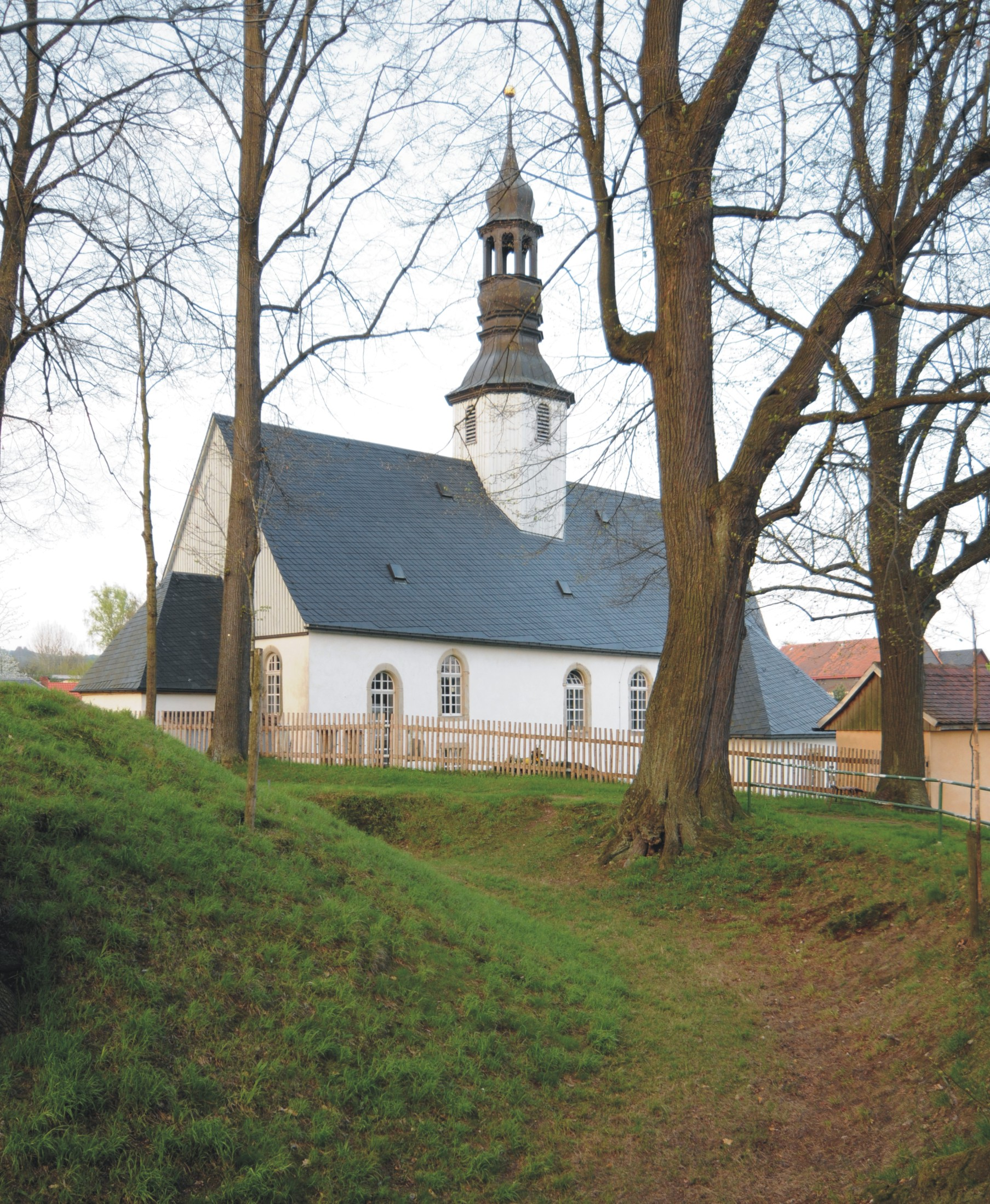 Evangelische Pfarrkirche in Ulbersdorf bei Hohnstein (Landkreis Sächsische Schweiz-Osterzgebirge, Sachsen, Deutschland)